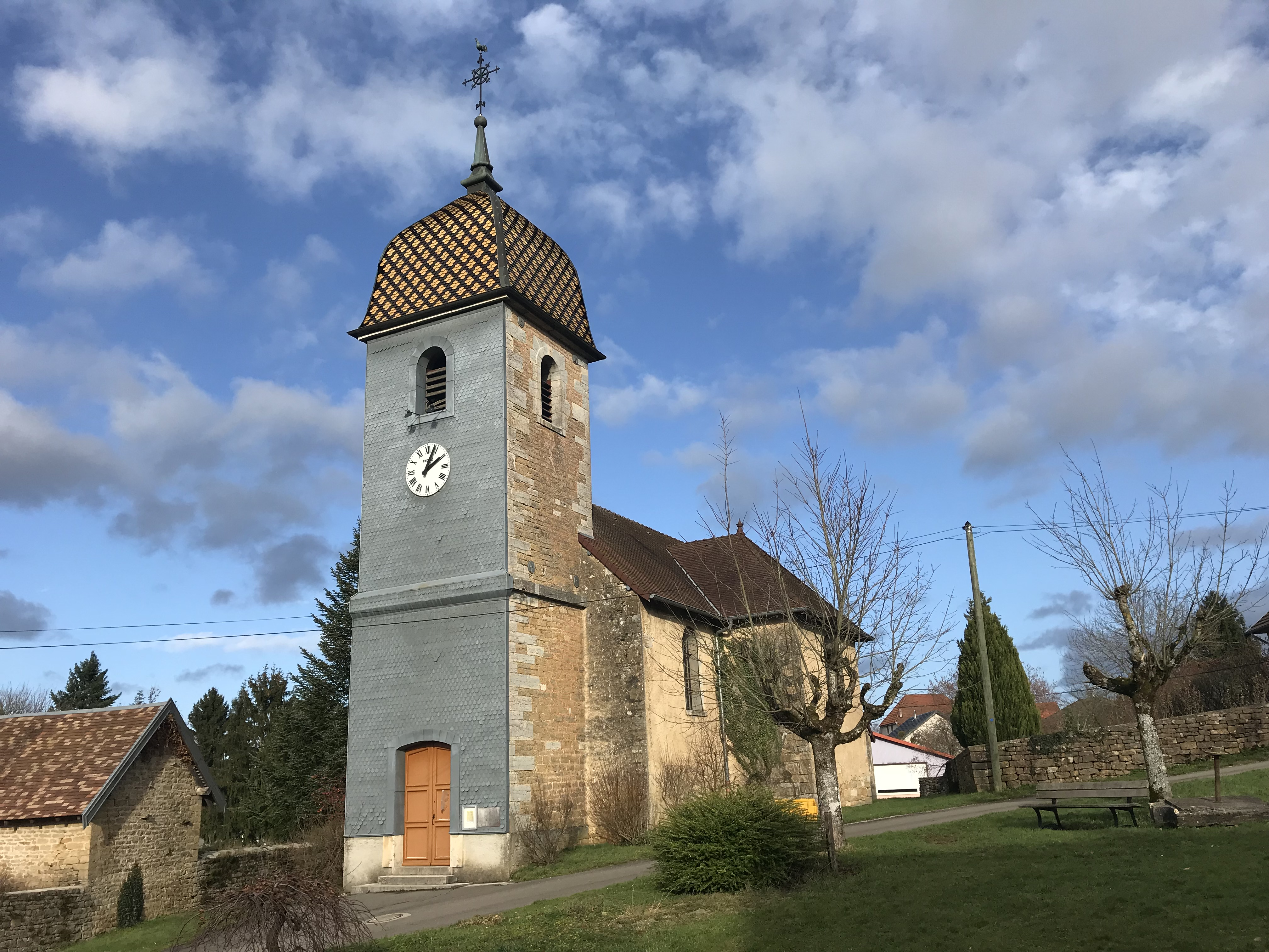 Image de Ferrières-les-Bois (Doubs, France) en janvier 2018.